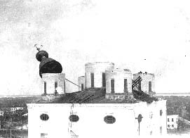 Разрушение Архангельского кафедрального собора во имя Святой Троицы, 1929.